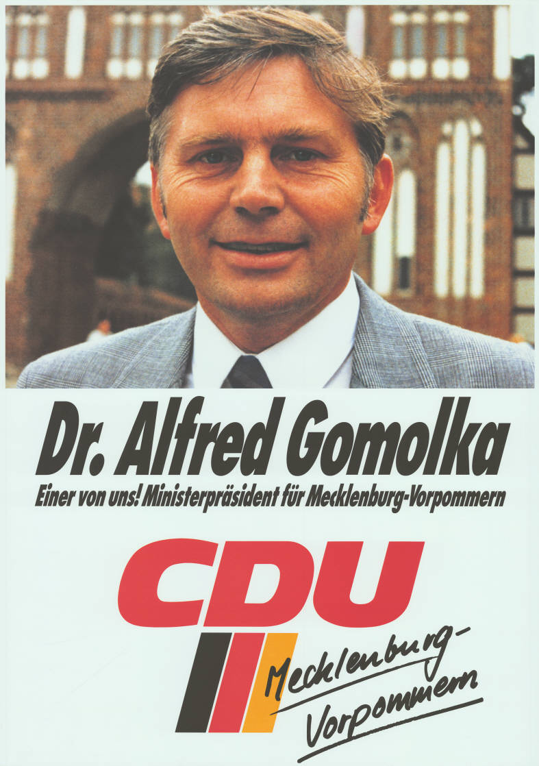 Dr. Alfred Gomolka Einer von uns! Ministerpräsident für Mecklenburg-Vorpommern CDU Mecklenburg-Vorpommern Abbildung: Porträtfoto - Nationalfarben Plakatart: Kandidaten-/Personenplakat mit Porträt Auftraggeber: CDU Mecklenburg-Vorpommern Objekt-Signatur: 10-034 : 1 Bestand: Landtagswahlplakate Mecklenburg-Vorpommern (10-034) GliederungBestand10-18: Landtagswahlplakate Mecklenburg-Vorpommern (10-034) » CDU Lizenz: KAS/ACDP 10-034 : 1 CC-BY-SA 3.0 DE